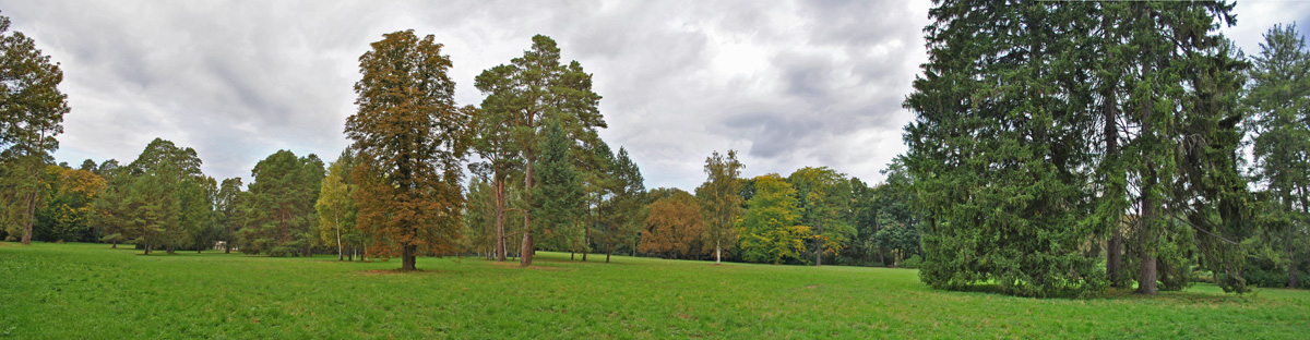 «Олександрія», Білоцерківський район, Білоцерківська міська рада, Фурсівська та Пилипчанська сільські ради